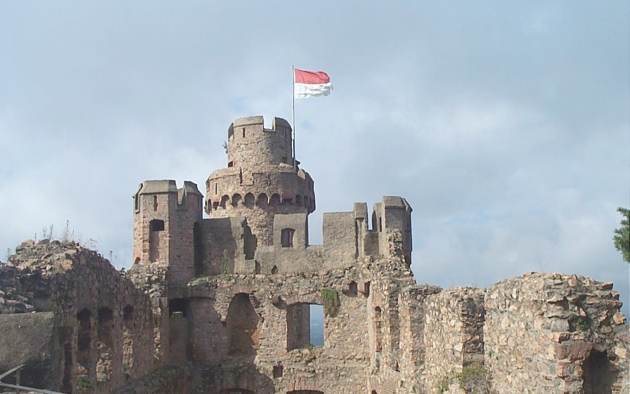 Auberbacher Schloss in Bensheim Auerbach